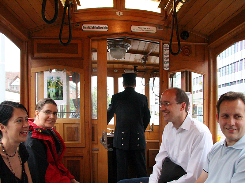 Ce 2/2 der Strassenbahn Zürich-Oerlikon-Seebach (Fahrgastkabine und Führerstand)